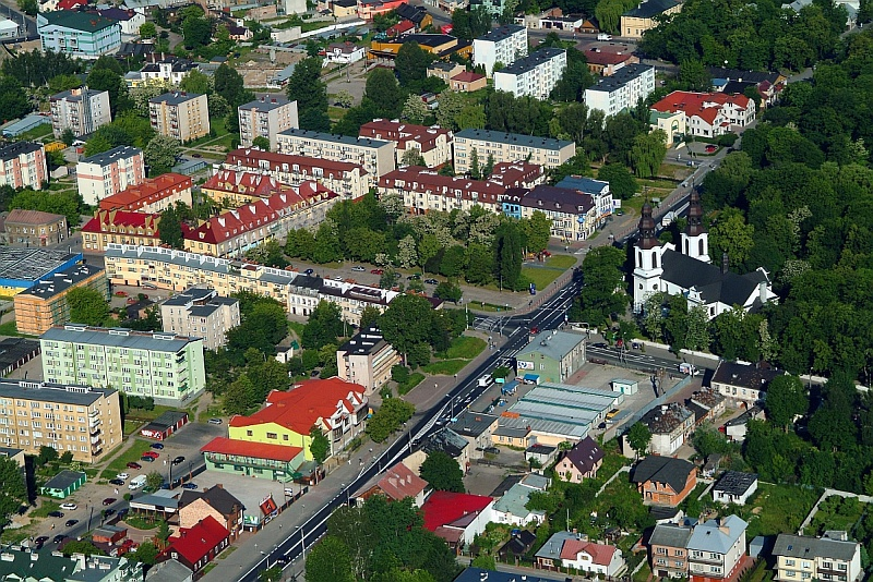 Zdjęcie lotnicze Mińska Mazowieckiego obejmujące historyczne centrum miasta - obecny plac Stary Rynek Stary Rynek znajduje się na przeciwko kościoła. Dalsze (wyżej na zdjęciu) skupisko zieleni to rzeka Srebrna, a w prawym górnym rogu Pl. Kilińskiego (Nowy Rynek).